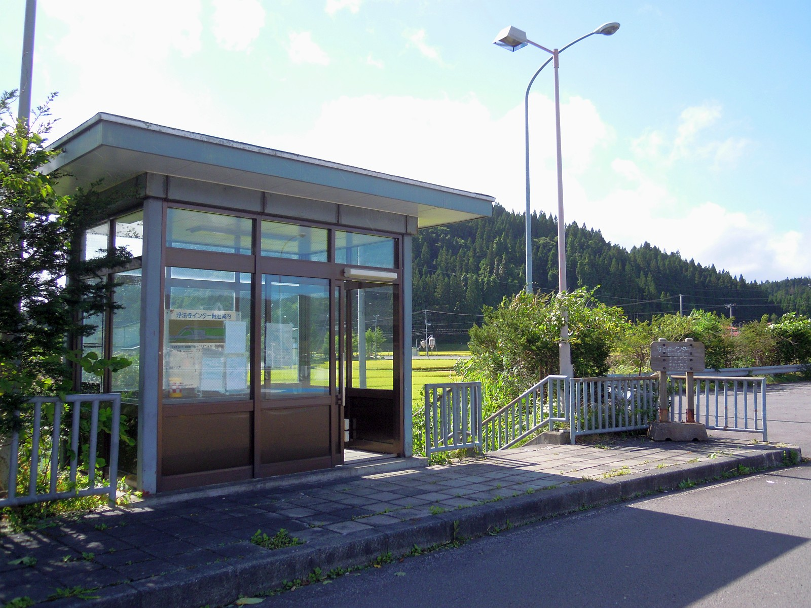 岩手県二戸市の八戸道浄法寺インターチェンジ内にある浄法寺インターバスストップ。